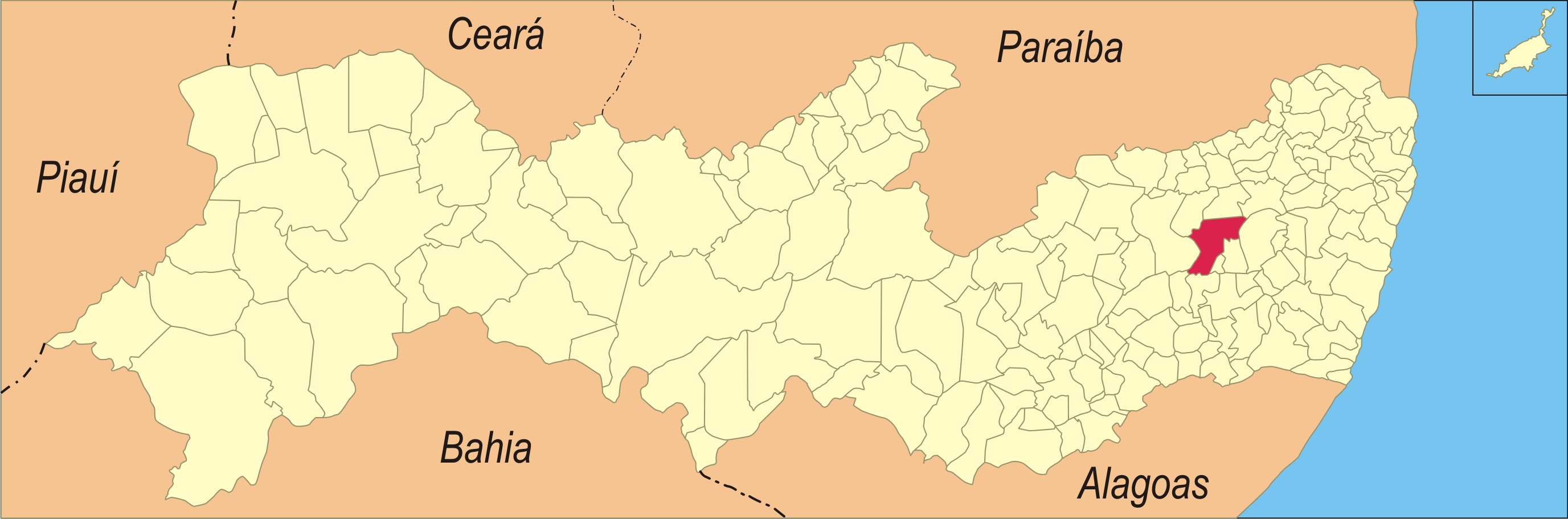 Localização da cidade em Pernambuco